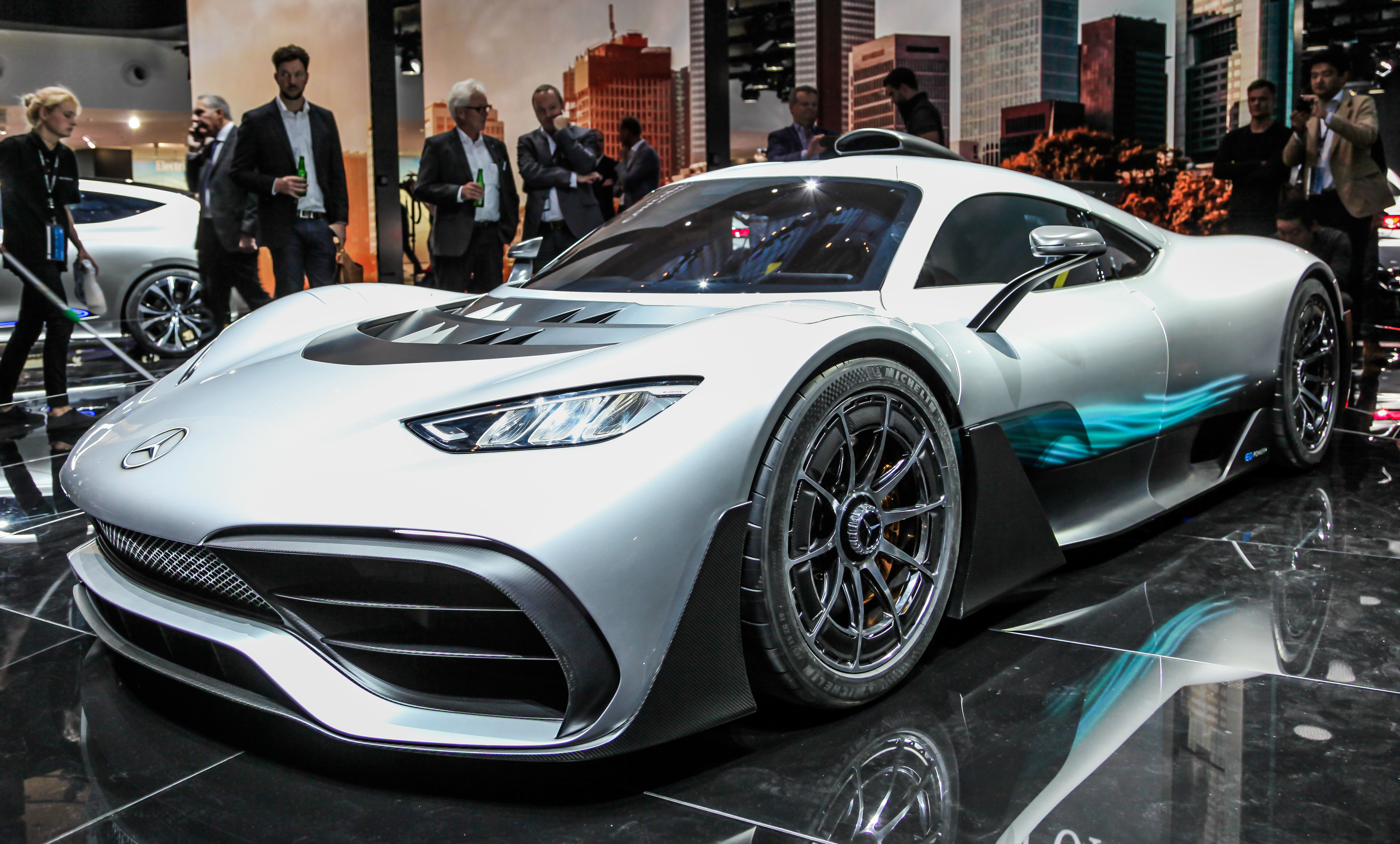 Mercedes-AMG Project One